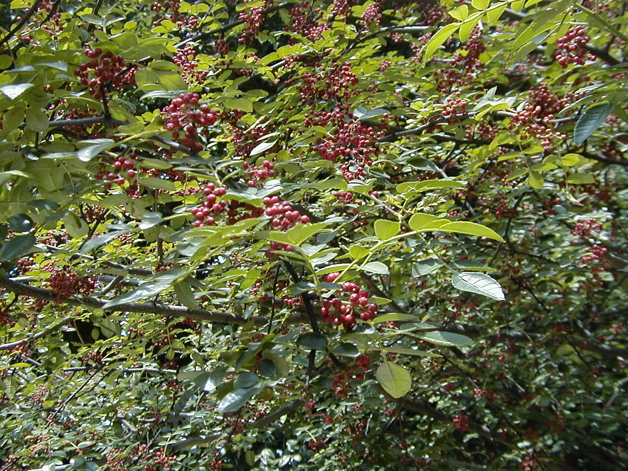 Zanthoxylum americanum. Real Jardín Botánico de Madrid.